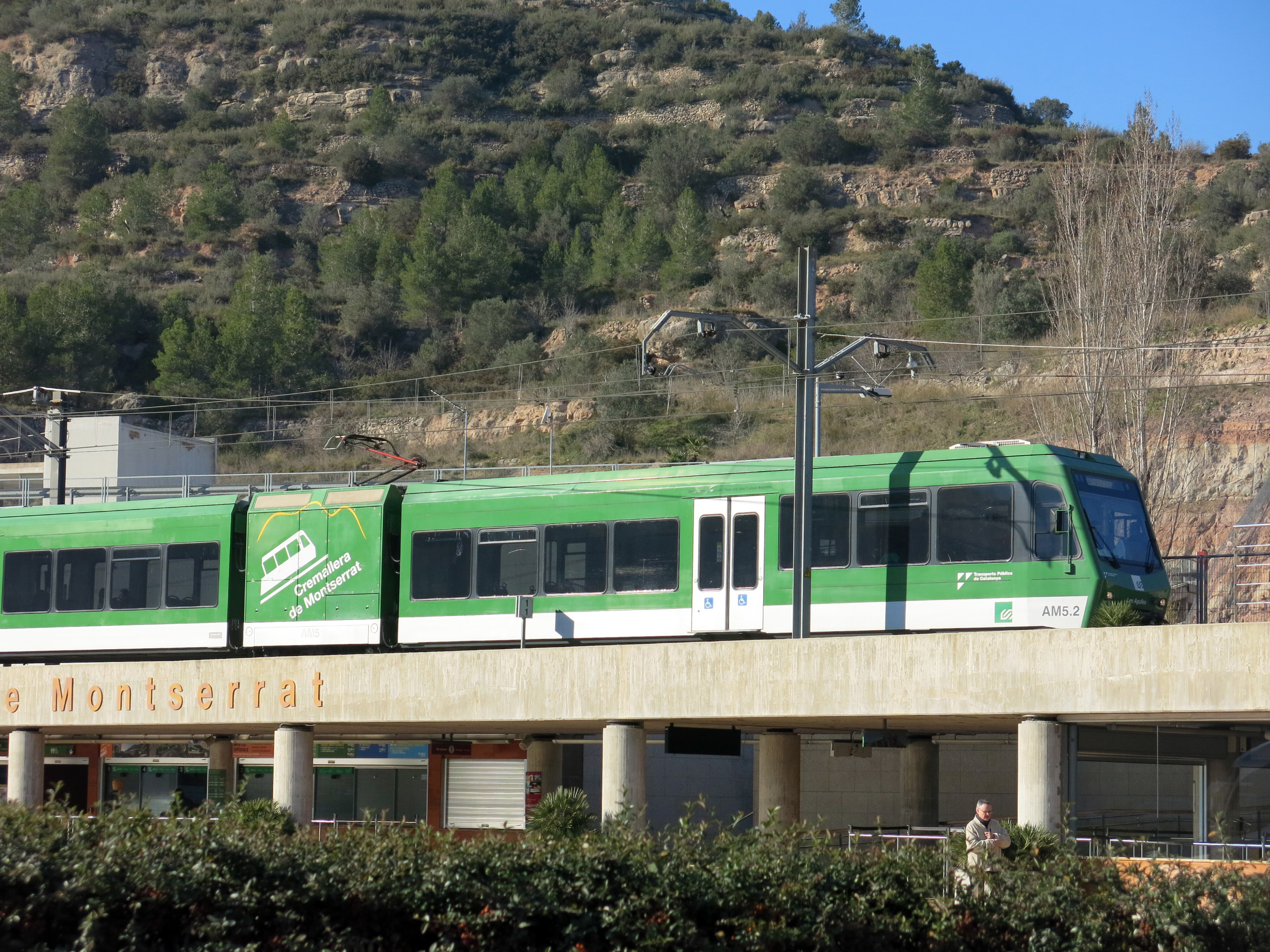 El cremallera de Montserrat prop de l'estació de Monistrol Vila)